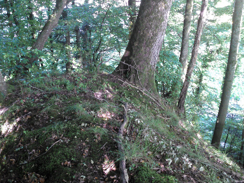 Schloßbückle bei Wutöschingen, Landkreis Waldshut, Teil des inneren Walles. Belegung ungeklärt.